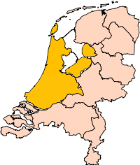 In mooglike yndieling fan de Rânestêdprovinsje.